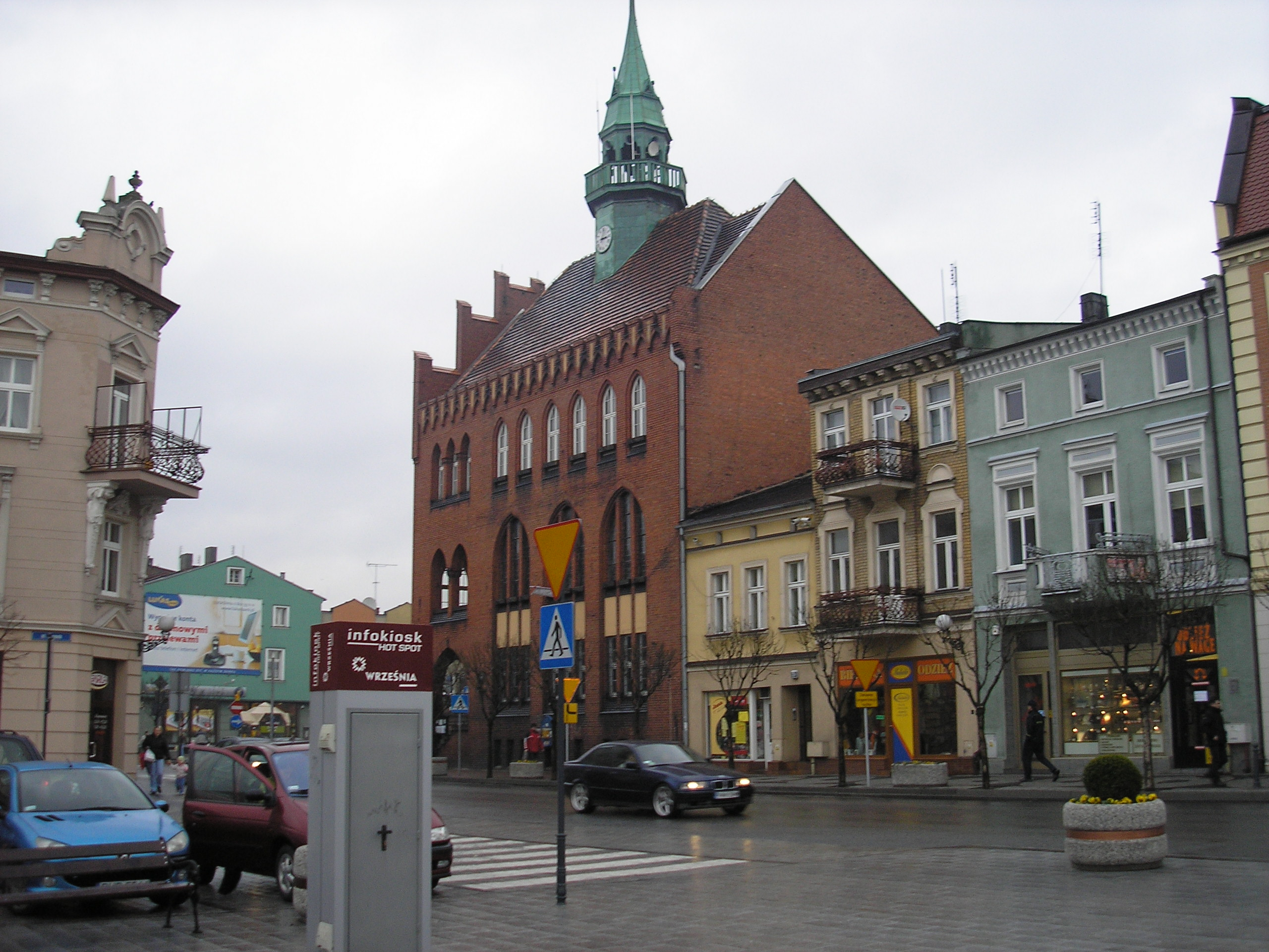 Ratusz we Wrześni